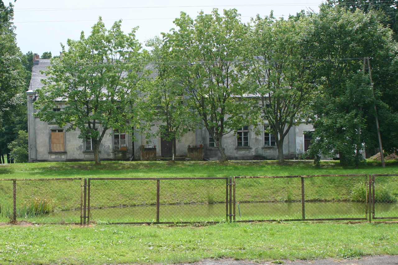 Kąty, Polska, powiat kętrzyński - zabytkowy dwór